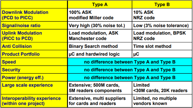 Comparación de algunos aspectos de las tarjetas de tipo A y B referenciadas en el estándar.